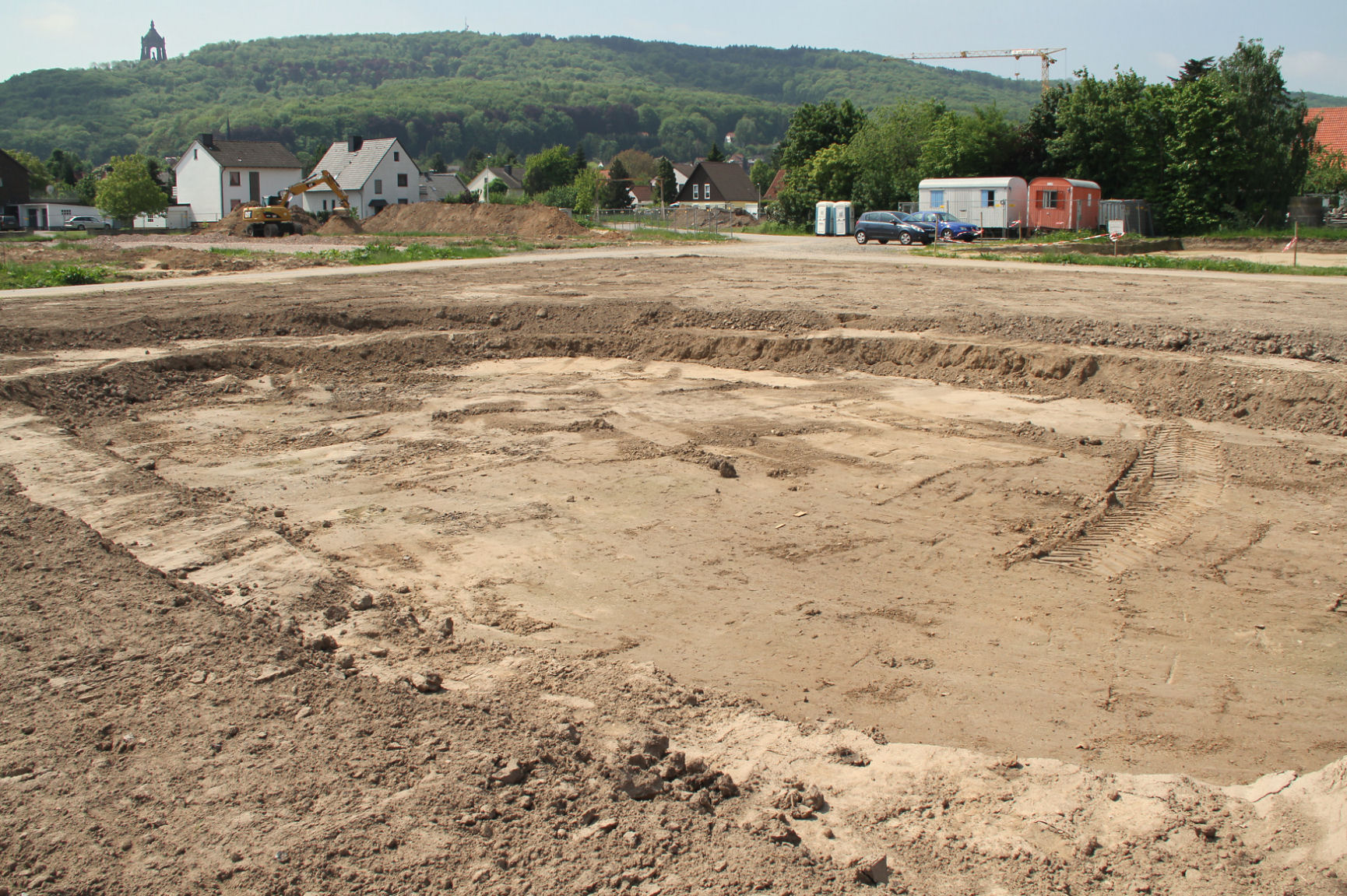 Ausgrabung auf dem Areal des Römerlagers Porta Westfalica